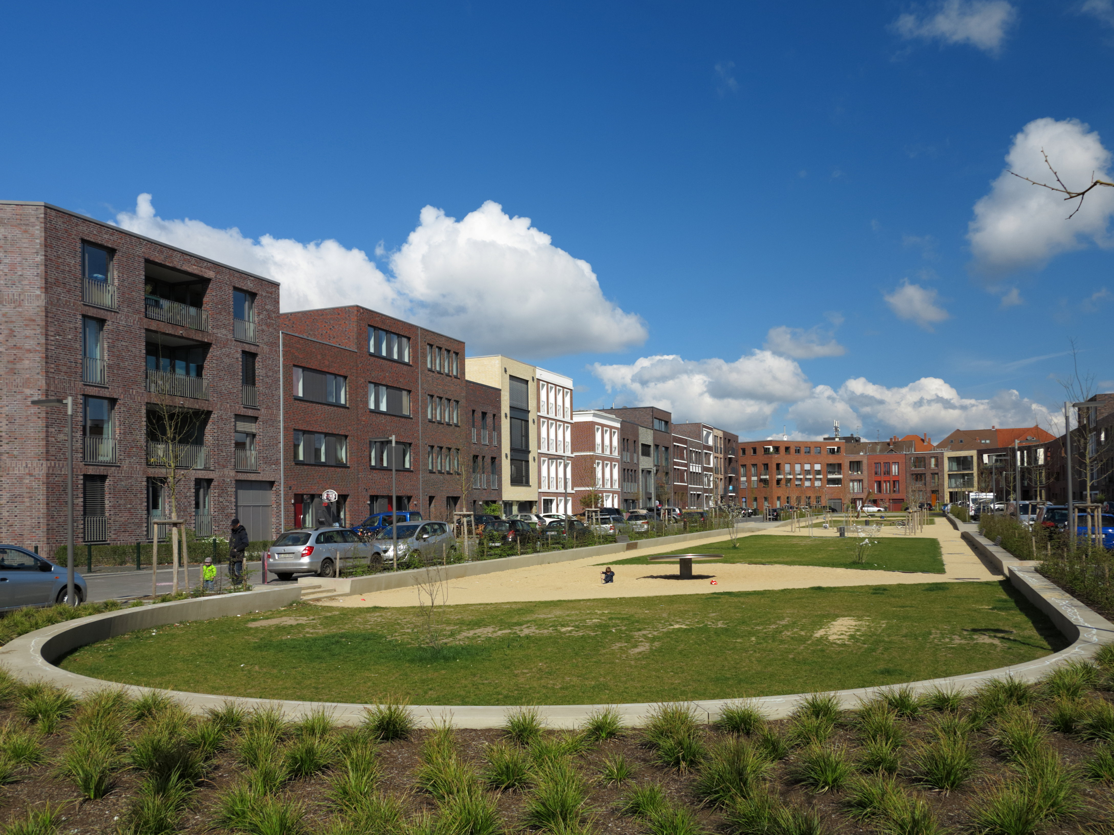 Braunschweig: St. Leonhards Garten, das Wohnquartier entstand 2009 auf dem Gelände des ehemaligen Stadtbahnbetriebshofs als Bundesmodellprojekt im Rahmen des Forschungsprogramms Experimenteller Wohnungs- und Städtebau (ExWoSt)